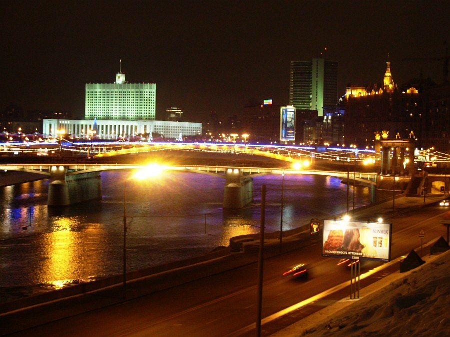 Panorama Moskwy. Na pierwszym planie rzeka Moskwa i most metra. W tle budynek Rady Ministrow (dawniej parlament tzw."Biały Dom"), z lewej w tle wysoki wieżowiec administracji miasta, dawniej siedziba RWPG. 16 gridnia 2005 r.